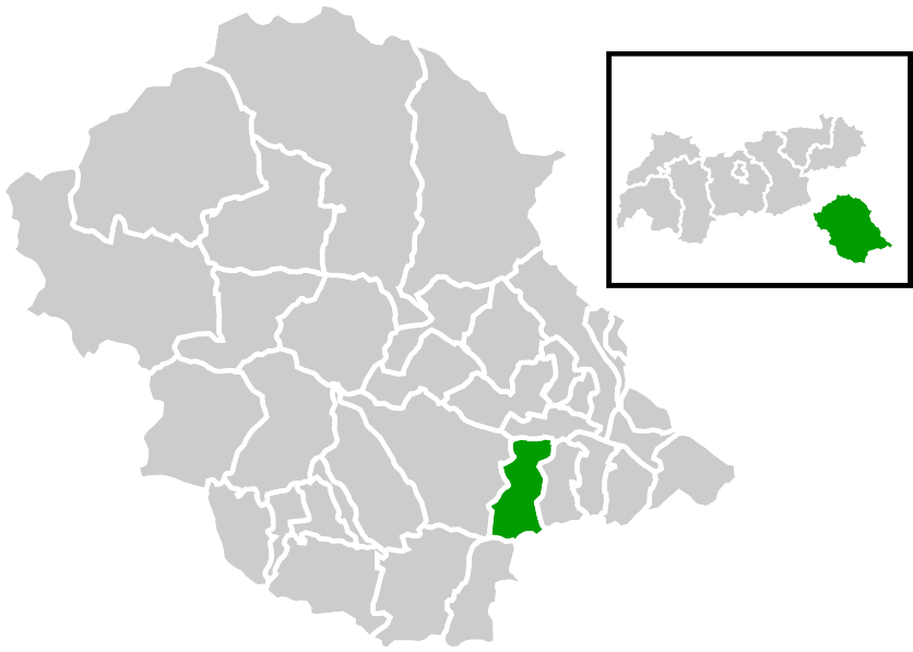 Lage der Gemeinde innerhalb des Bezirks Lienz